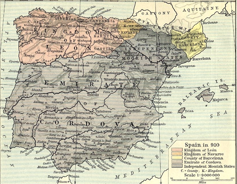 La península ibérica el año 910